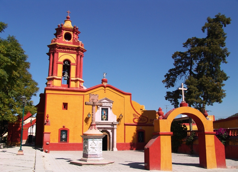 Parroquia de San Sebastian en el pueblo Magico de Bernal en el Estado de Querétaro